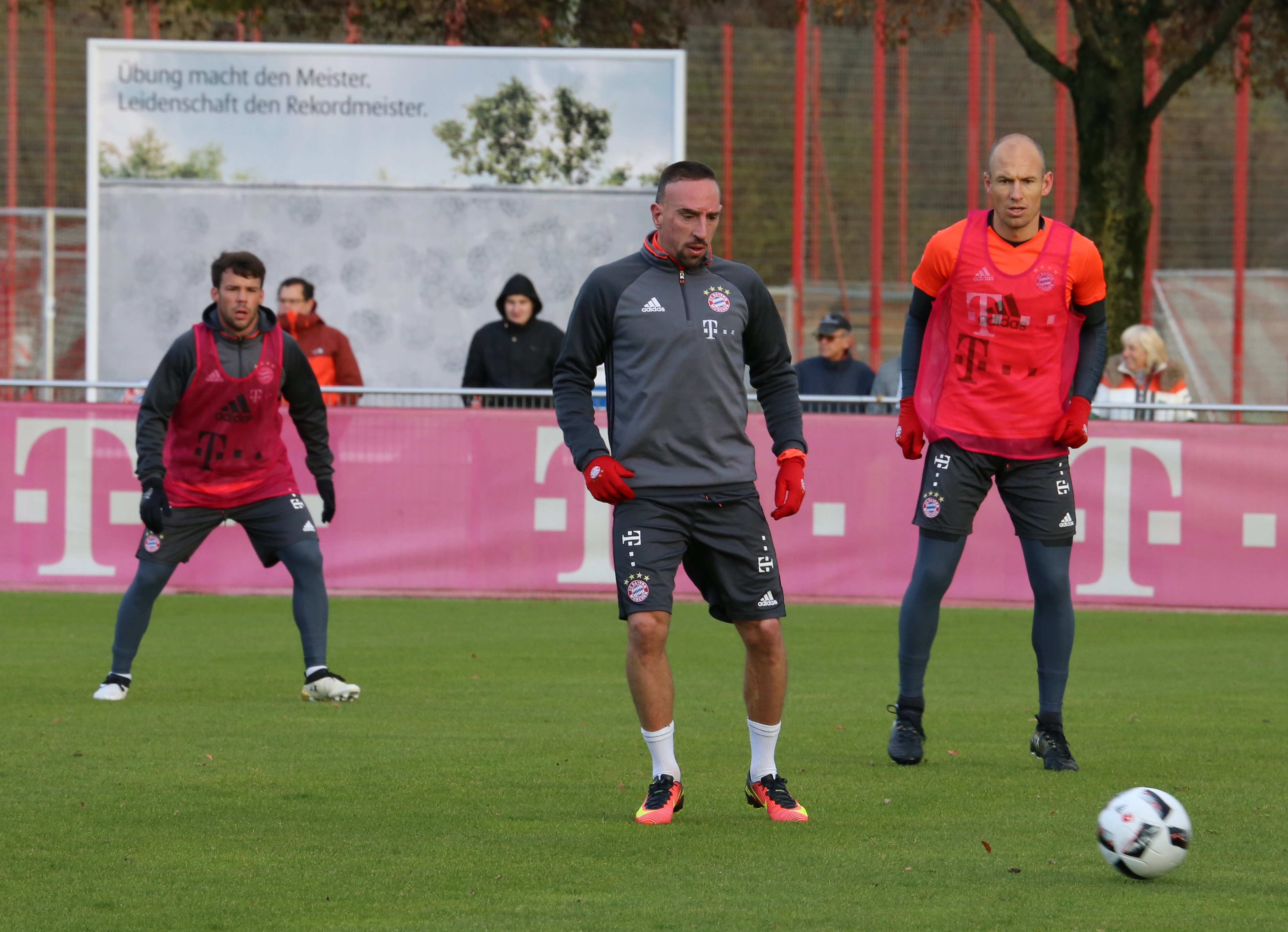 Franck Ribéry und Arjen Robben beim Training auf dem Gelände des FC Bayern München (November 2016)